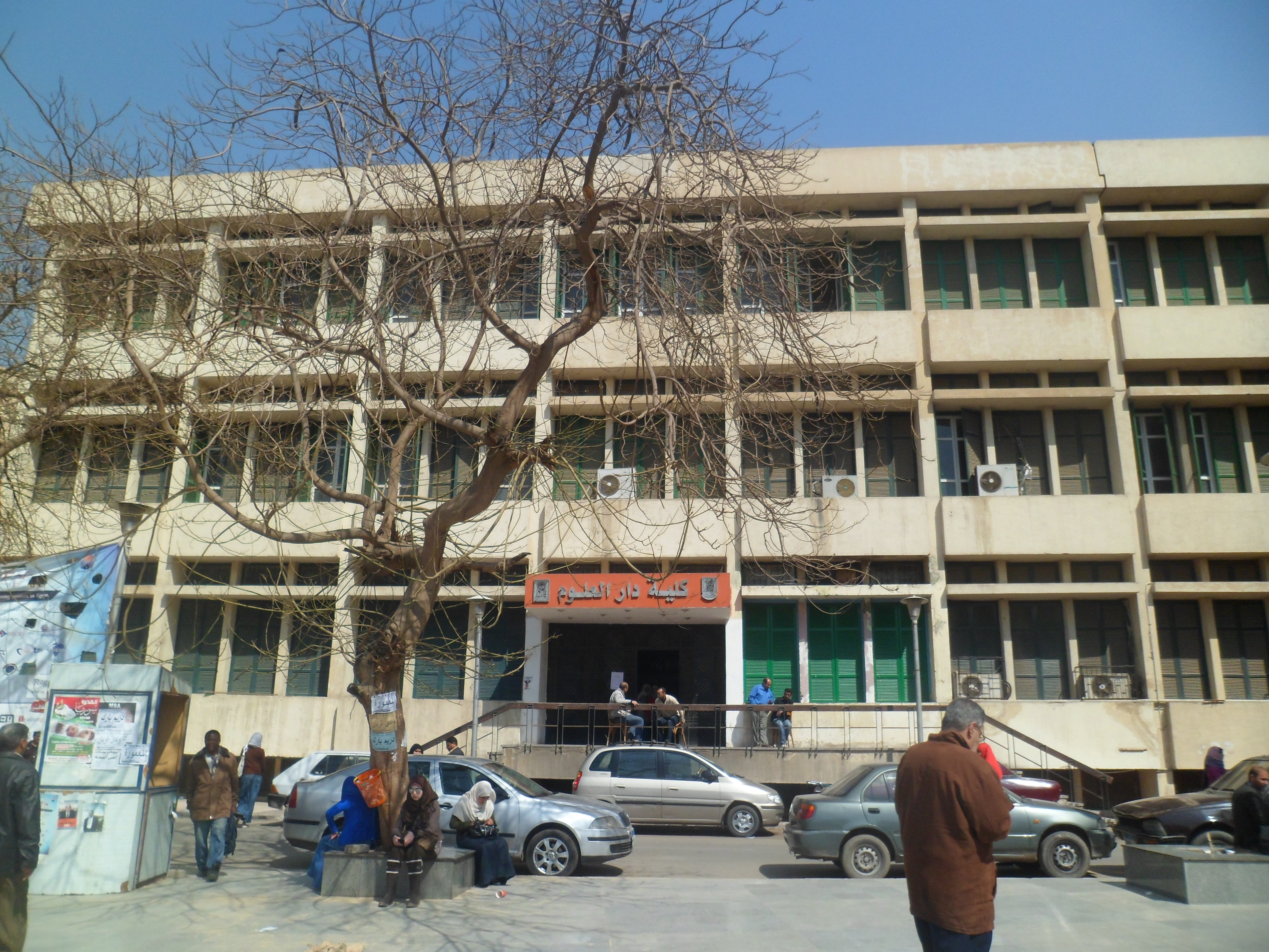 كلية دار العلوم، جامعة القاهرة